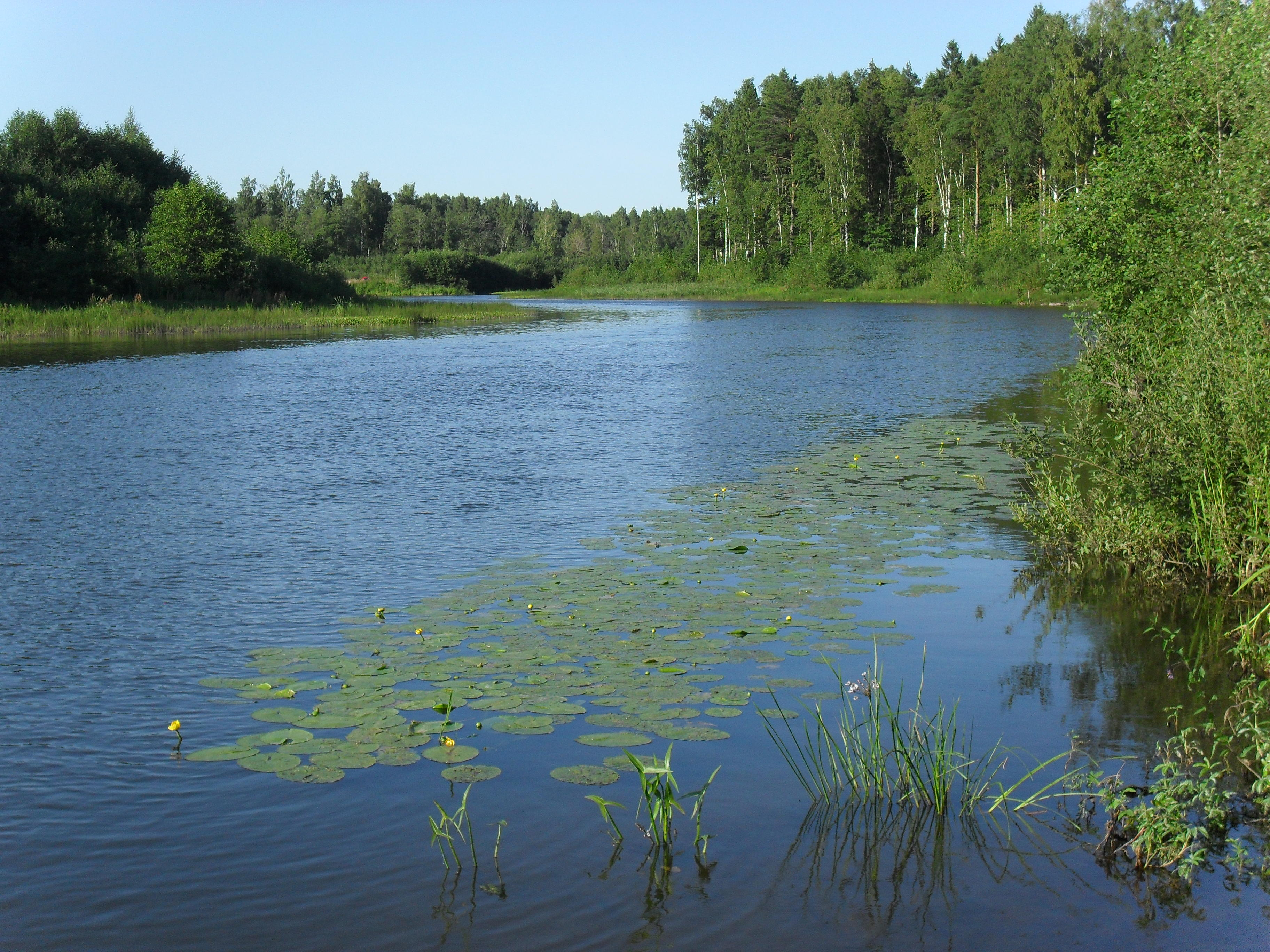 Mustajõgi Ida-Virumaal Vaivara vallas.